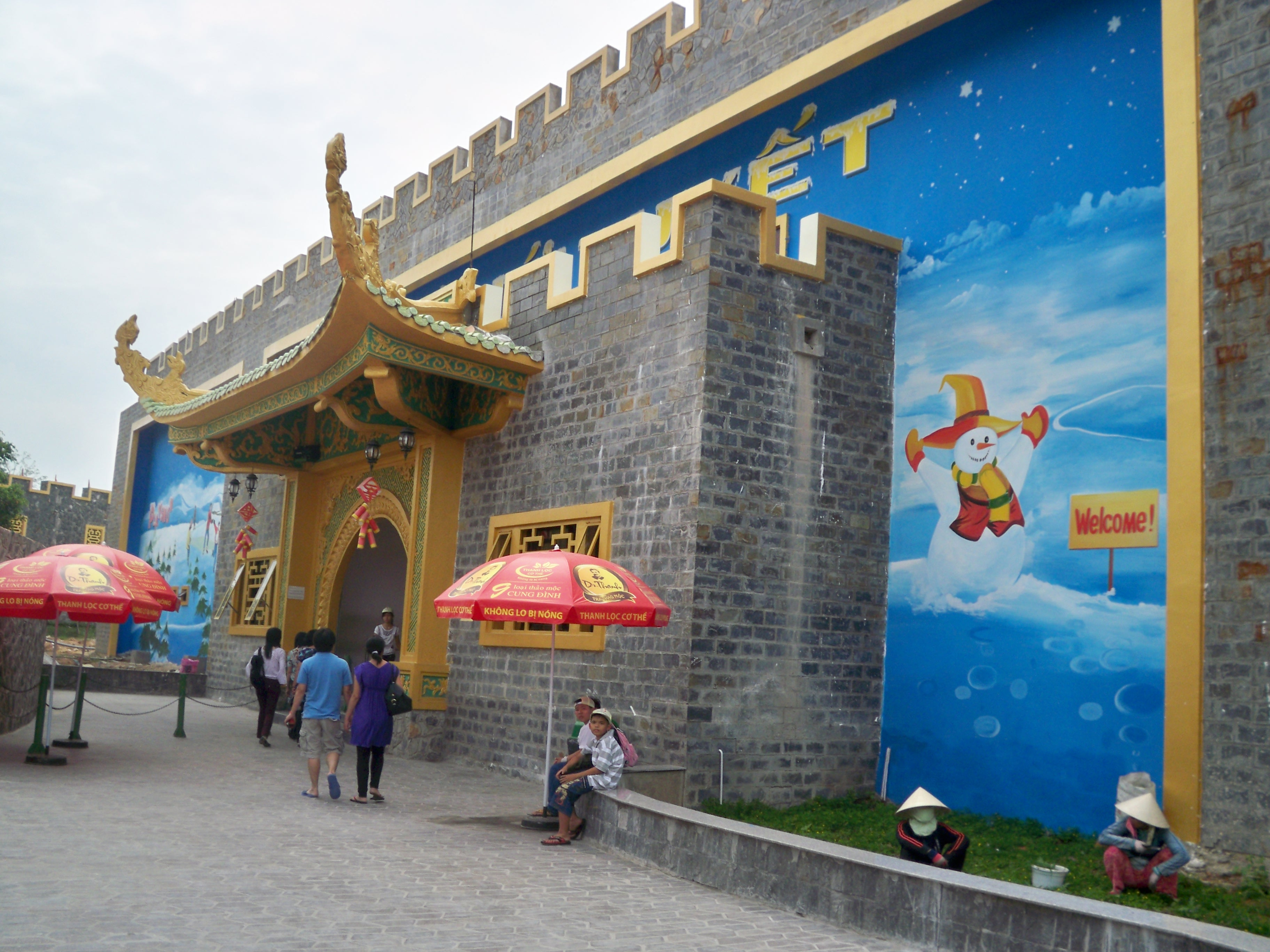 Đại Nam 3